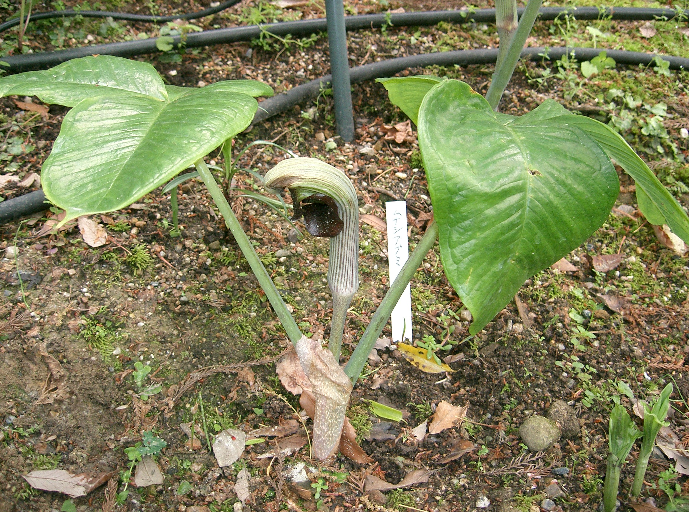 Scientific name Arisaema ringens